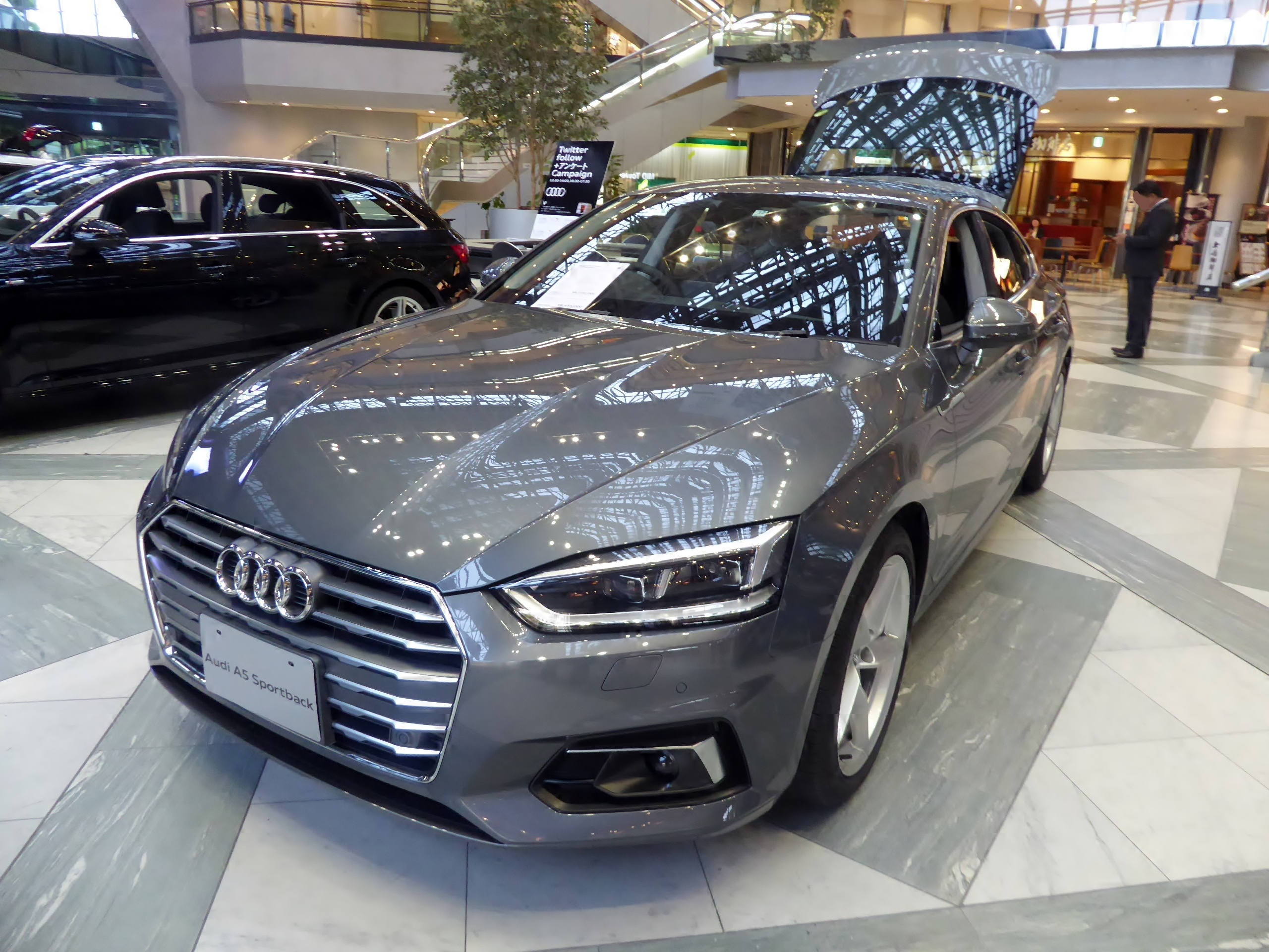 DBA-F5CVKL型アウディ・A5スポーツバック2.0TFSIスポーツをフロントから撮影。